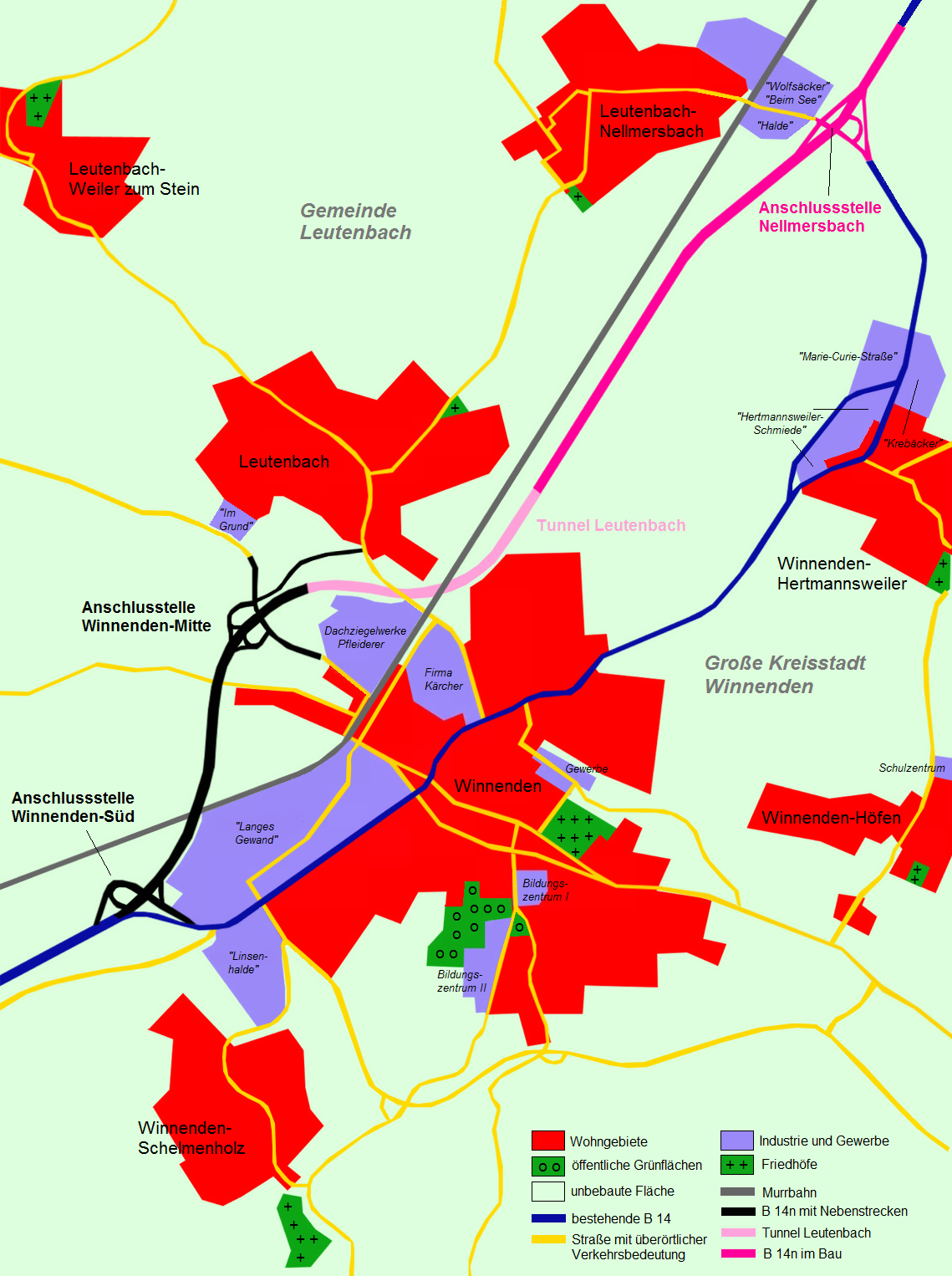 Übersichtskarte über den Verlauf der Bundesstraße 14n